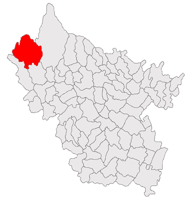 Categorie:Hărţi ale judeţului Buzău